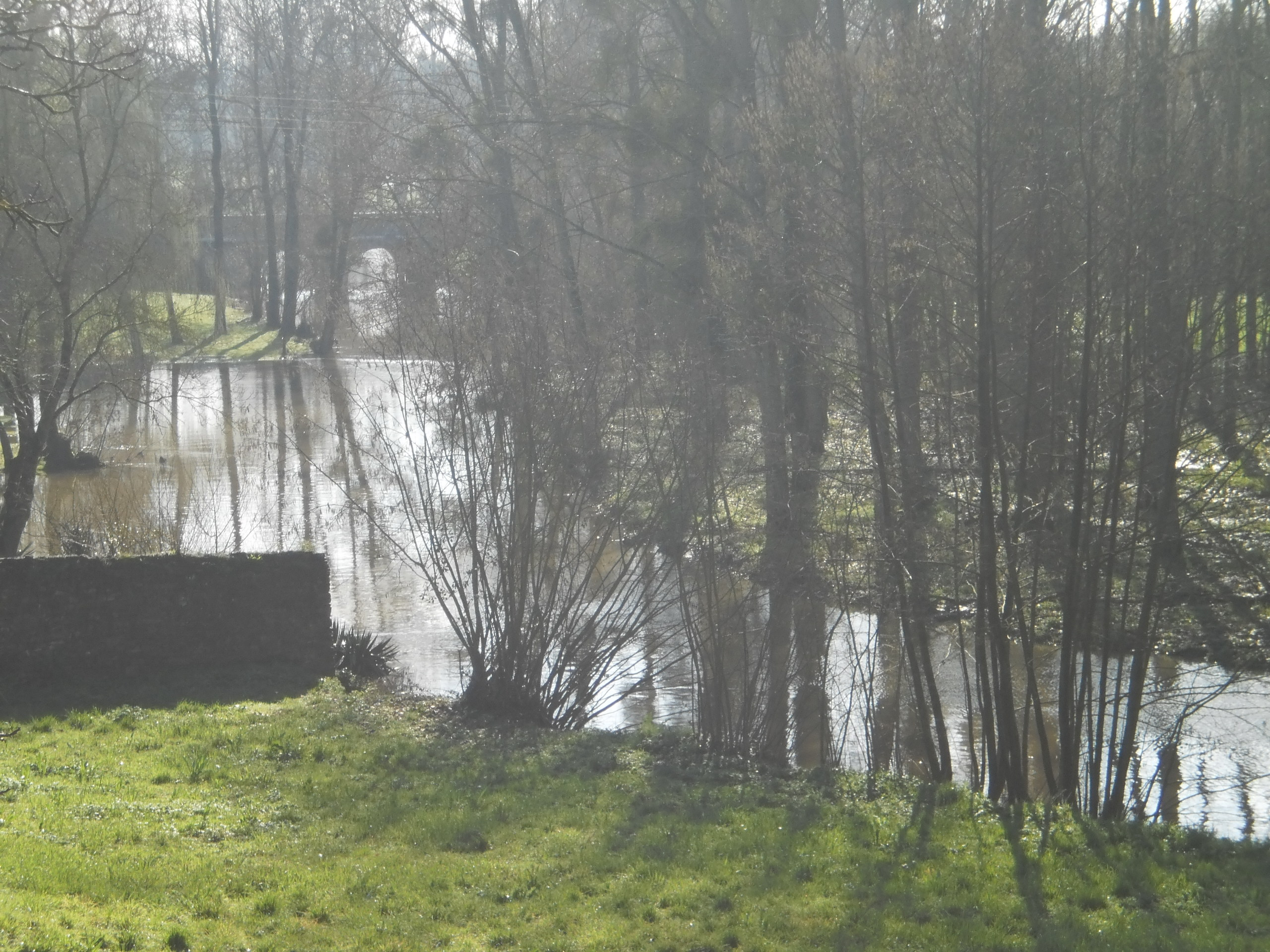 Bonnoeuvre (Loire-Atlantique, France) - vallée de l'Erdre